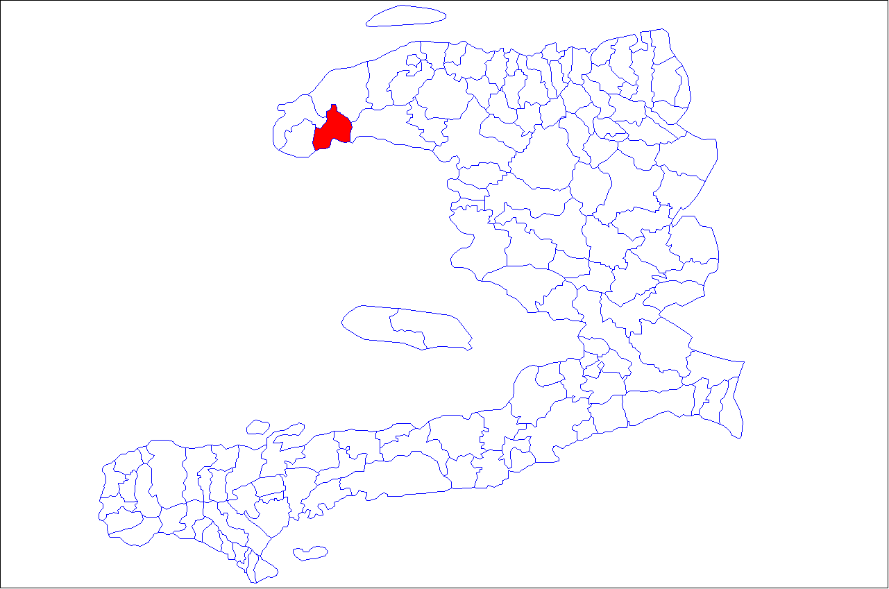 Localização da comuna de Baie-de-Henne, no Haiti.